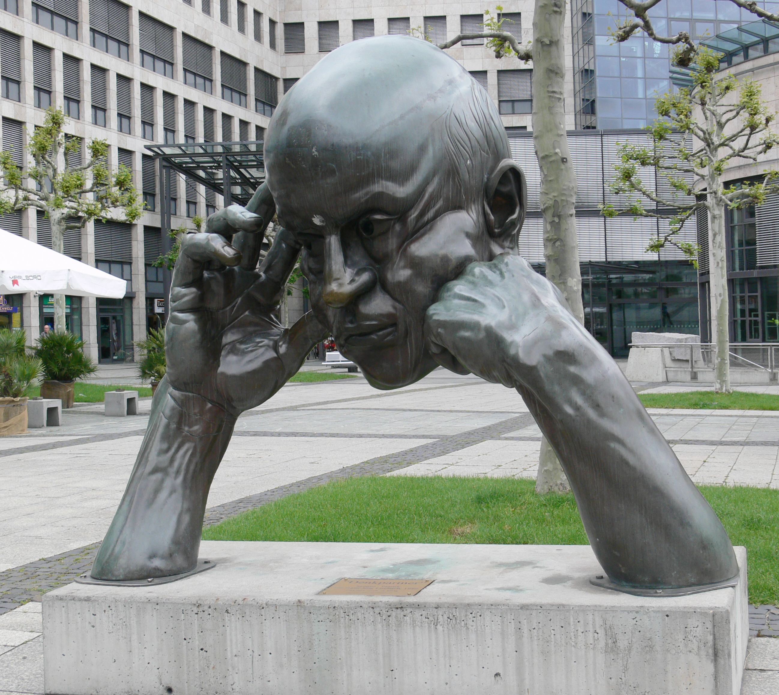 Bronze-Skulptur "Denkpartner" von Hans-Jörg Limbach, 1980, aufgestellt vor dem Friedrichsbau in Stuttgart, Leihgabe Erich Hildenbrand